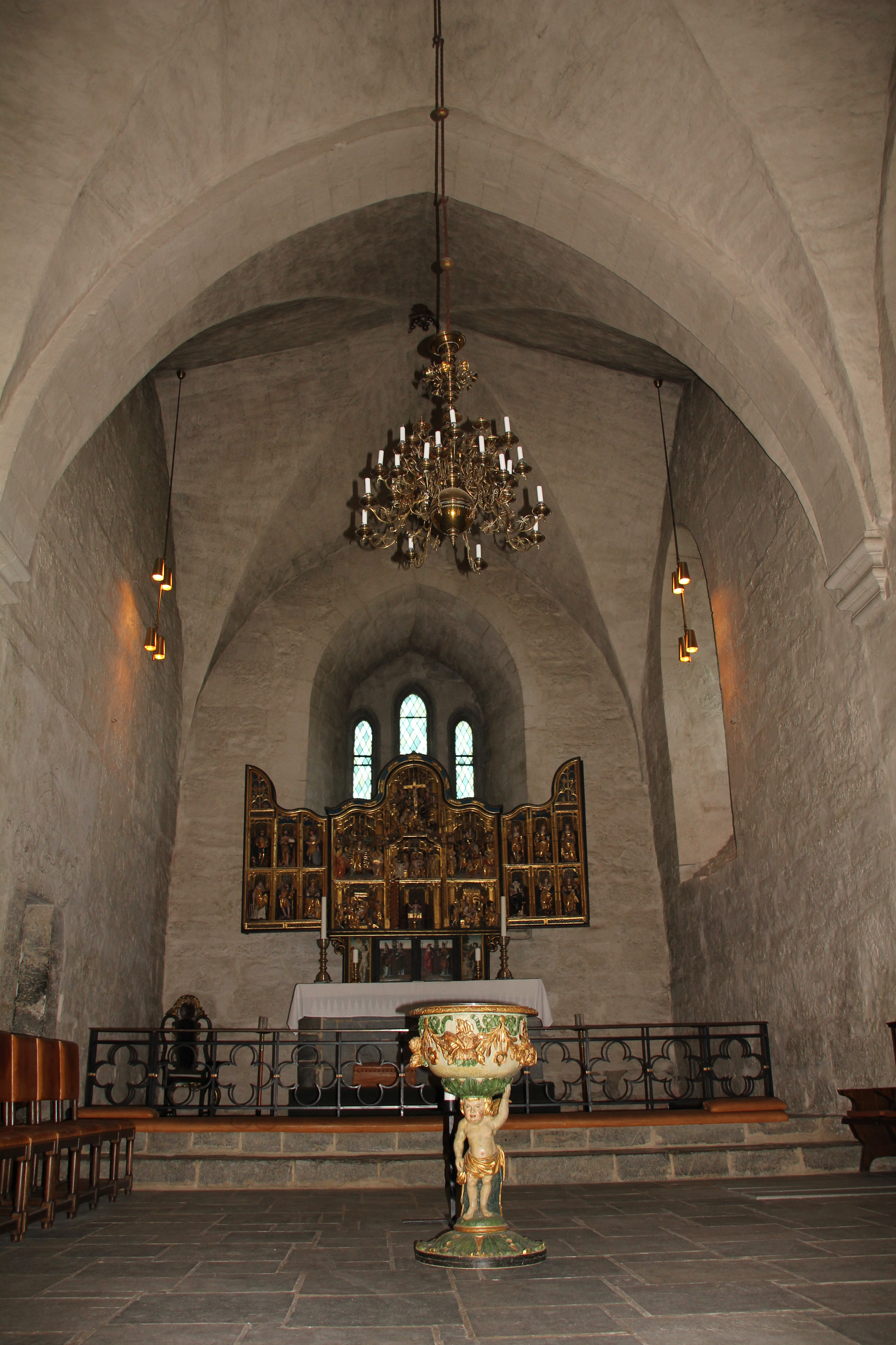 Alterrommet, vet dette har et annet navn, men kommer ikke på det i farten. Altertavla lukkes hver faste, slik at bildene fra Jesu lidelse kommer fram. Når altertavla er åpen kan man se disse hvis man går bak alteret. Altertavla åpnes igjen ved en høytidelig seremoni påskemorgen.